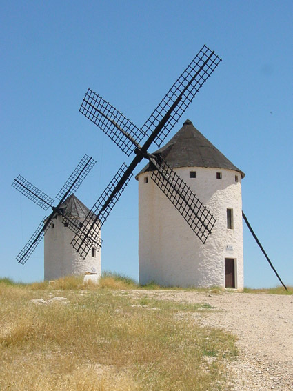 Molinos de viento en Campo de Criptana